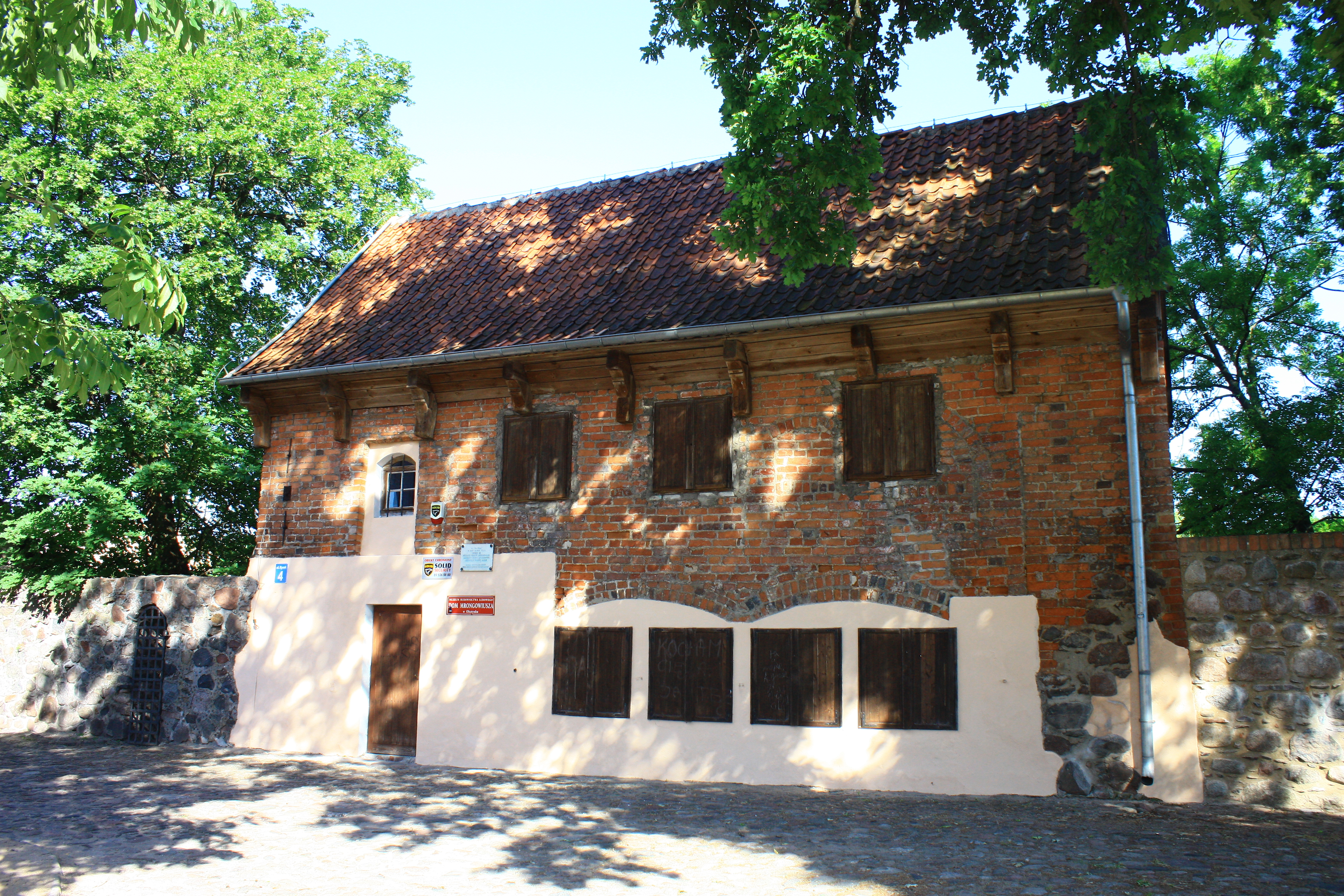 Olsztynek, dawna plebania ewangelicka - Dom Mrongowiusza, ob. muzeum, 1648, XIX